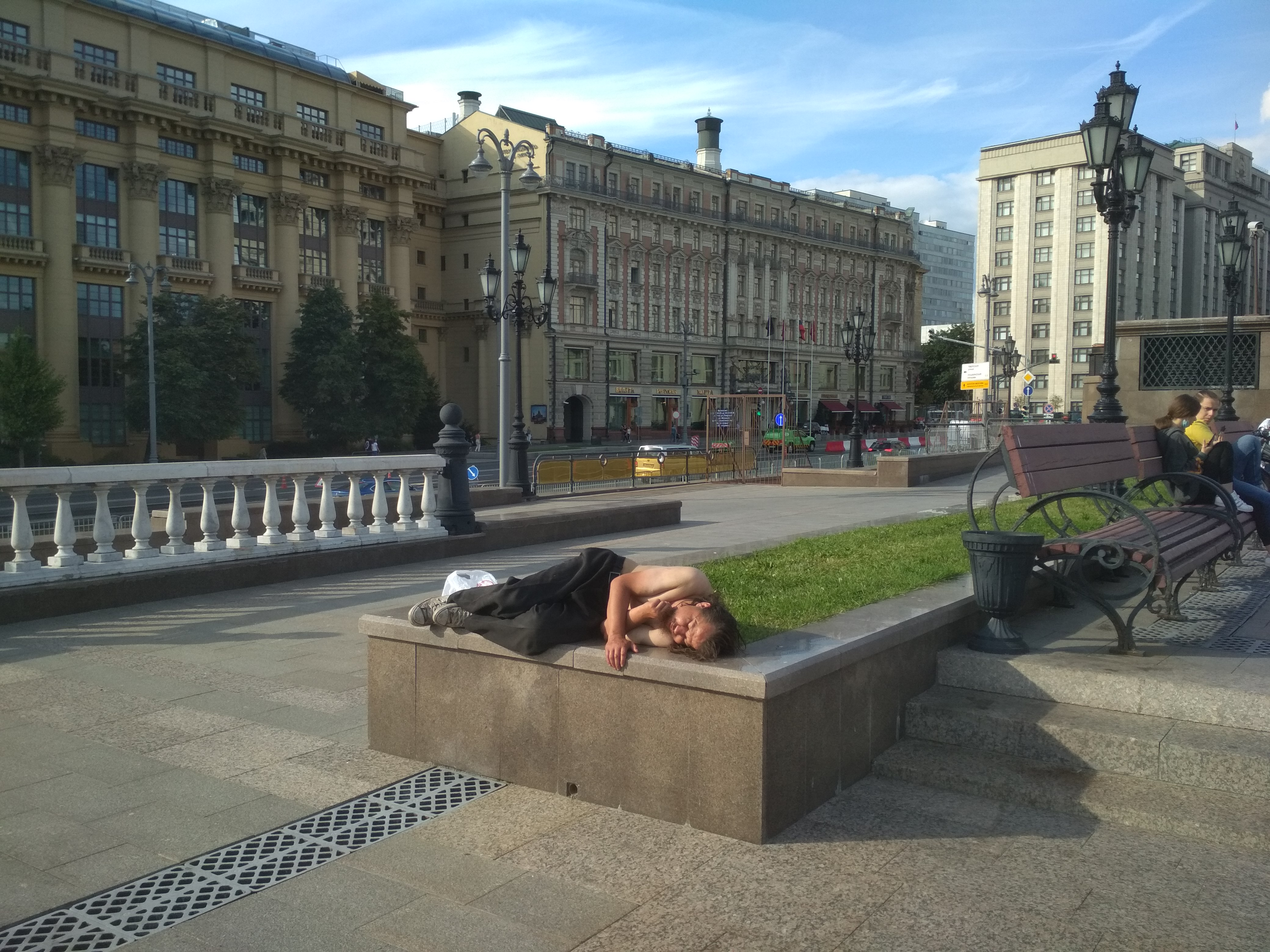 БОМЖ на Манежной площади, Москва, 2020 год. (Я ему оставил небольшой гонорар.)